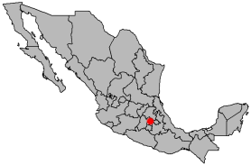 Locator map of Chimalhuacán, México, Mexico